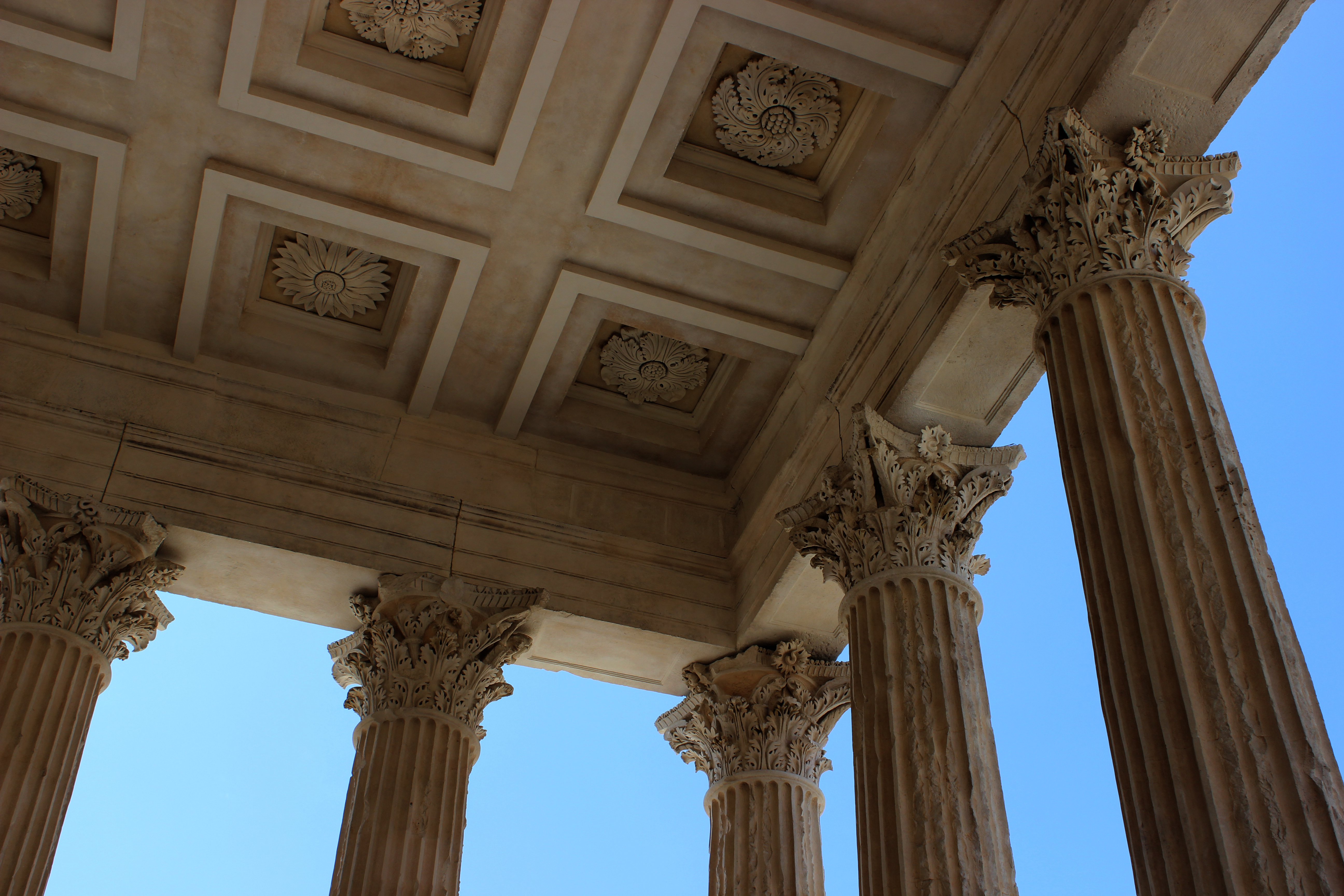 Toit à caissons et colonnes de la Maison Carrée de Nîmes, en France. .